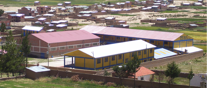 UAC Escoma